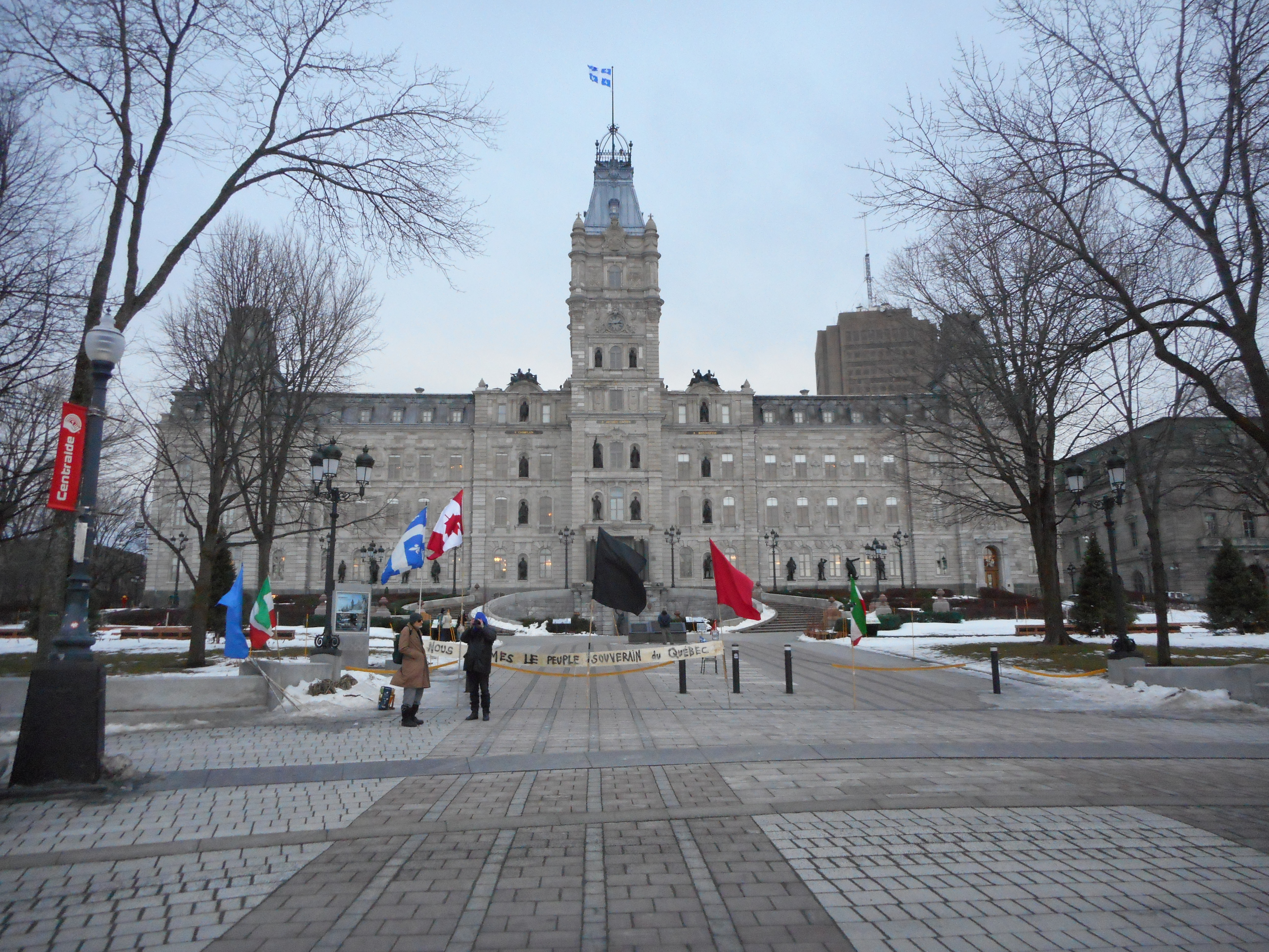 Hôtel du Parlement du Québec